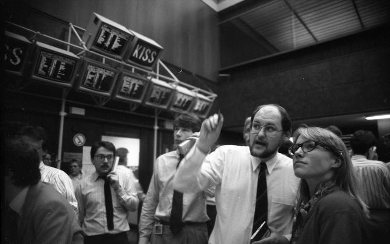 Juni 1988 Frankfurt am Main, Börse (Bond Market)